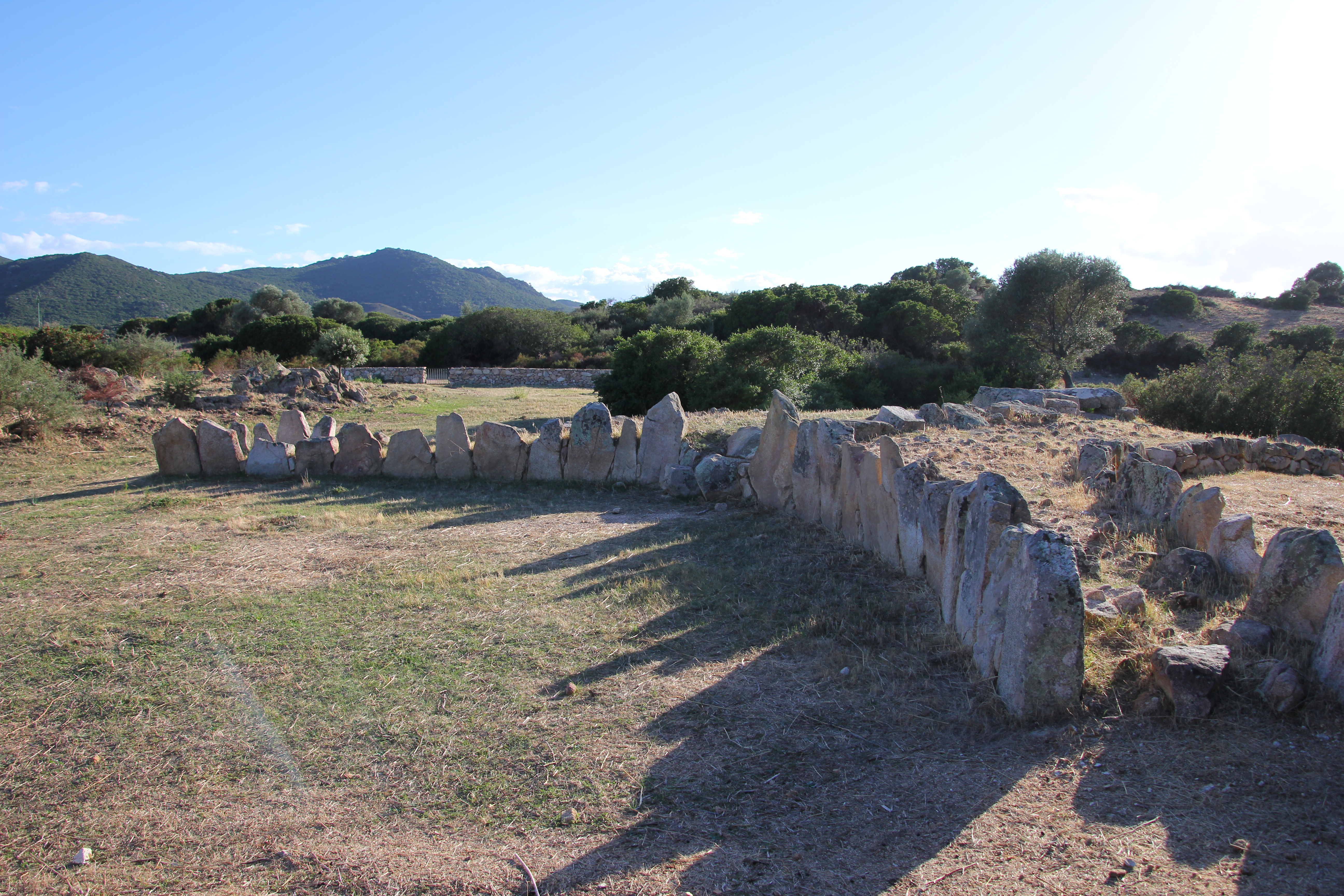 Siniscola - Tomba dei giganti di Su Picante